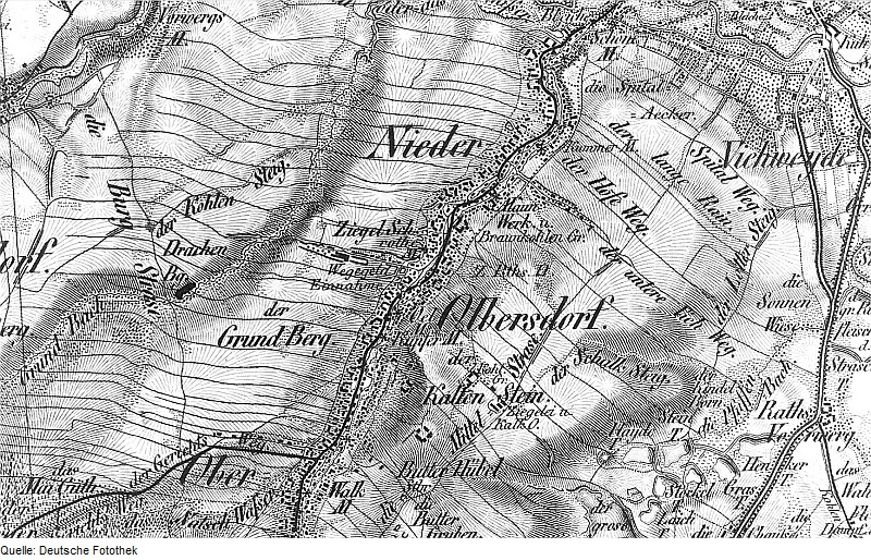 Original image description from the Deutsche Fotothek Olbersdorf. Oberreit, Sect. Zittau, 1844/46